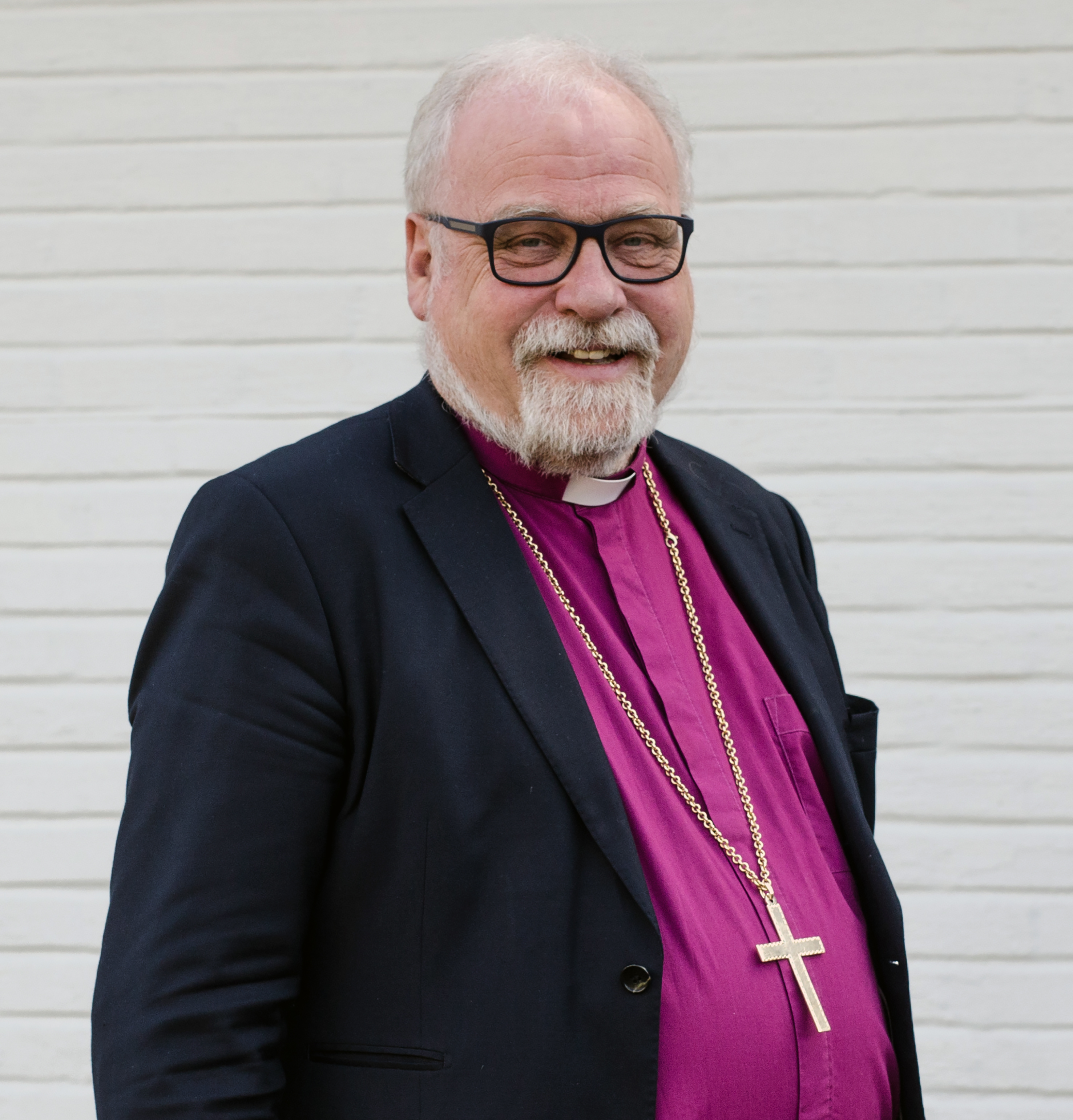 Atle Sommerfeldt, biskop i Borg